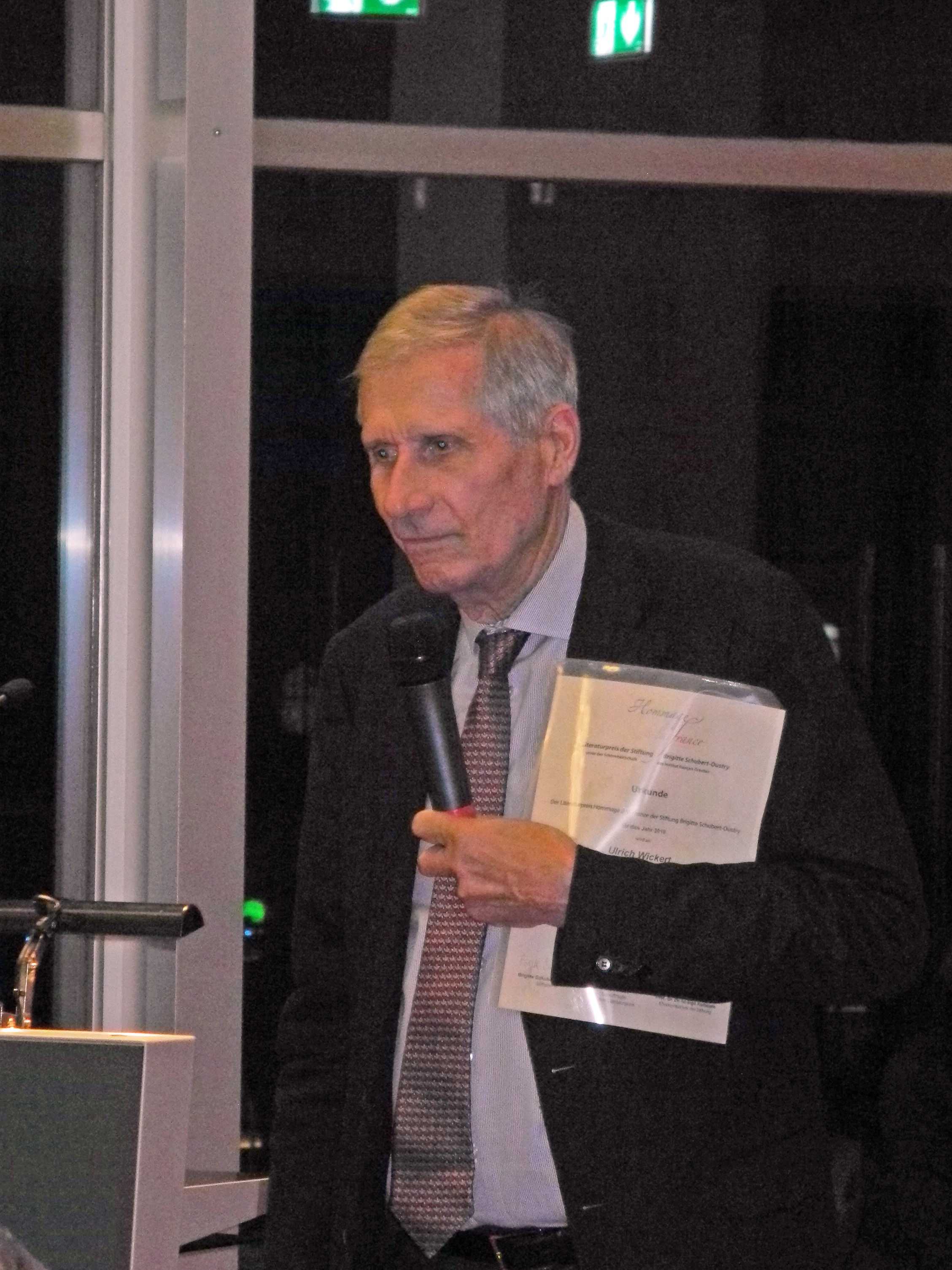 Ulrich Wickert – Preisträger des Literaturpreises „Hommage à la France“ im November 2018 im Dresdner Kulturpalast